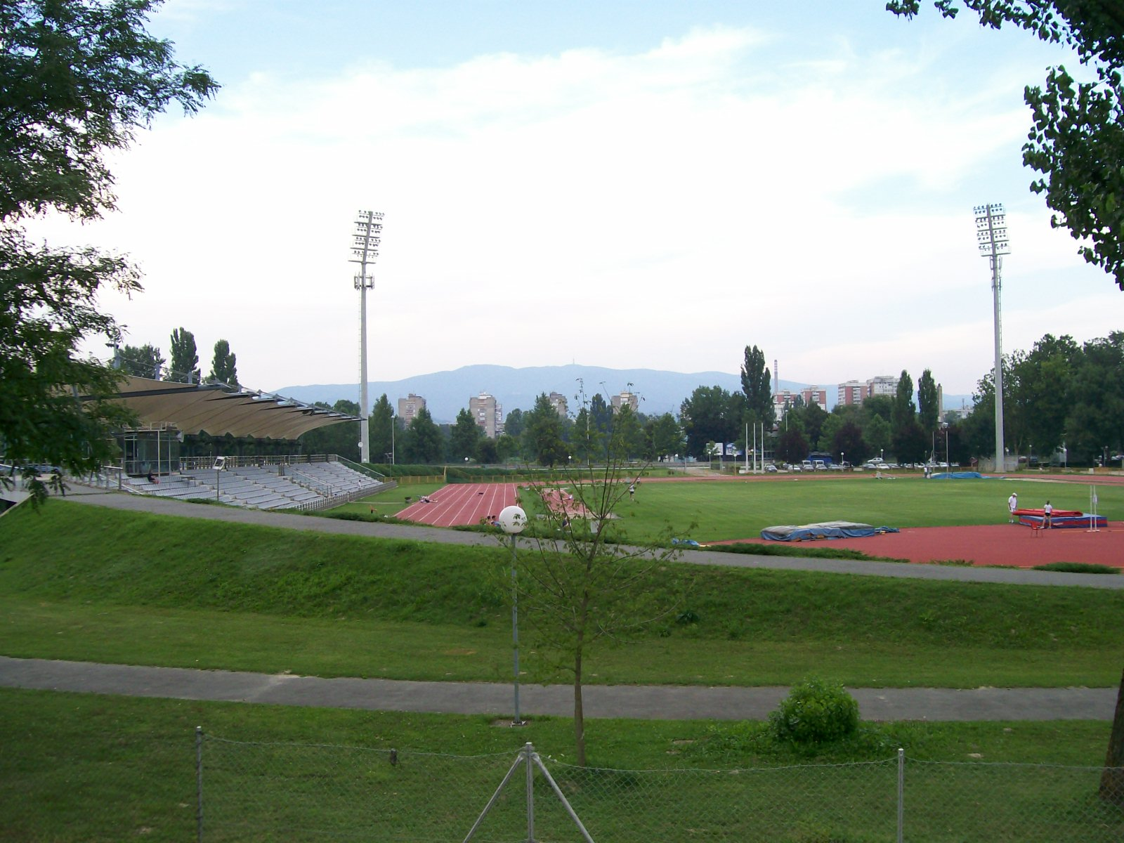 Atletski stadion ŠRC Mladost Zagreb